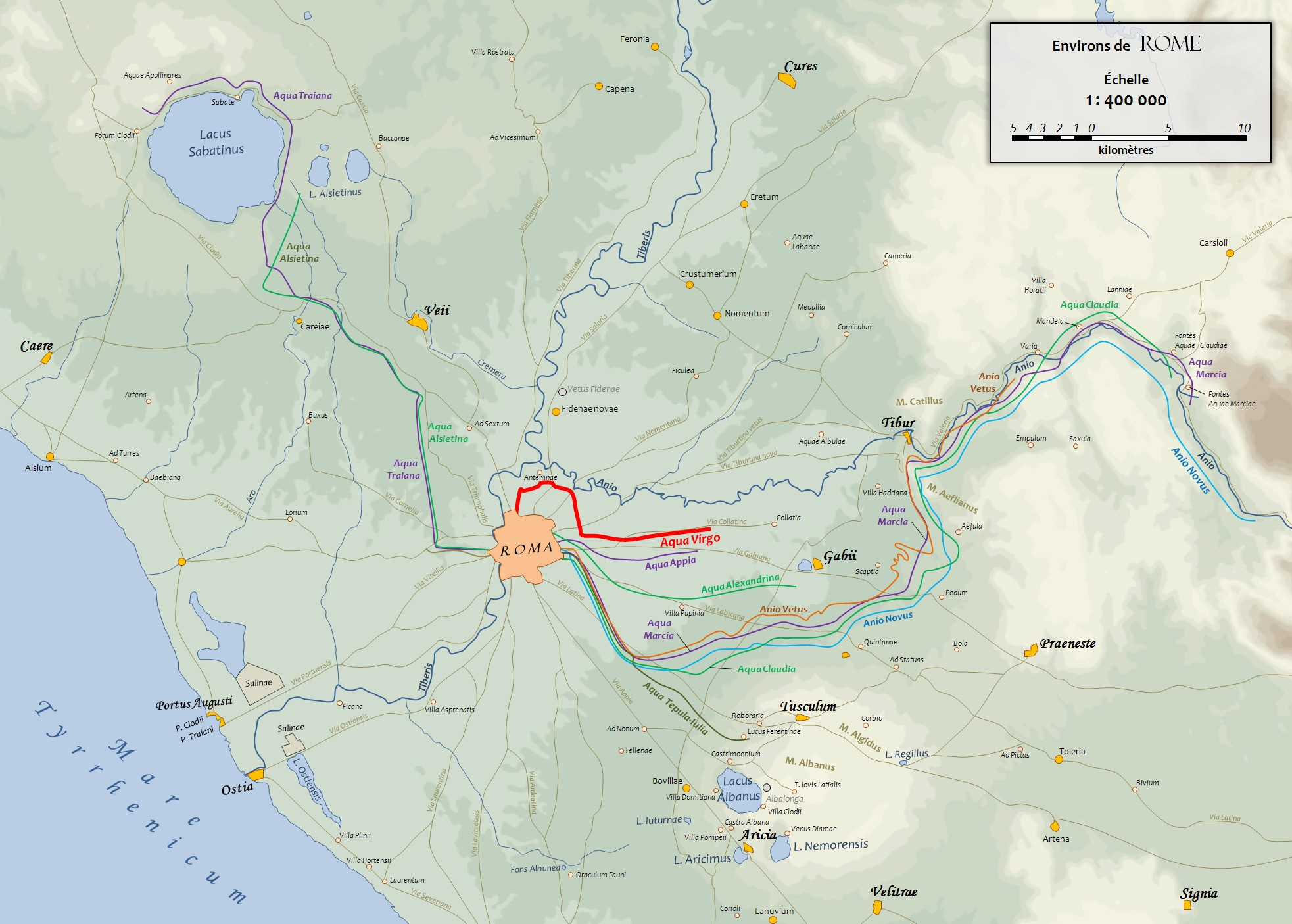 Carte du Latium antique sur lequel figure le tracé des aqueducs de Rome. D'après un fond de carte de 1886 (G. Droysens Allgemeiner Historischer Handatlas).